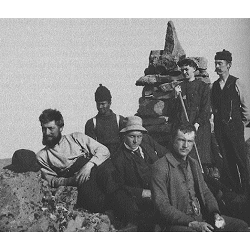 Da sinistra Cook, Henson, Astrup, Verhoeff, Josephine Peary e Peary durante la North Greenland Expedition